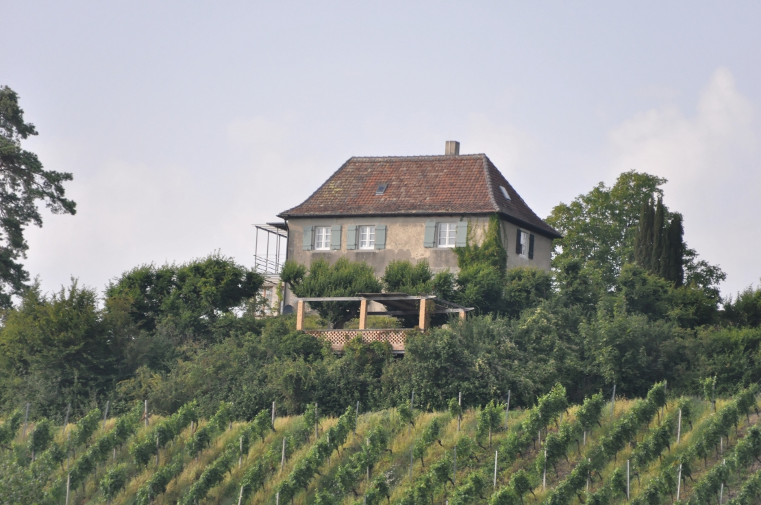 Meersburg 2012, Glaserhäusle (Schenke am See bei Annette von Droste-Hülshoff)